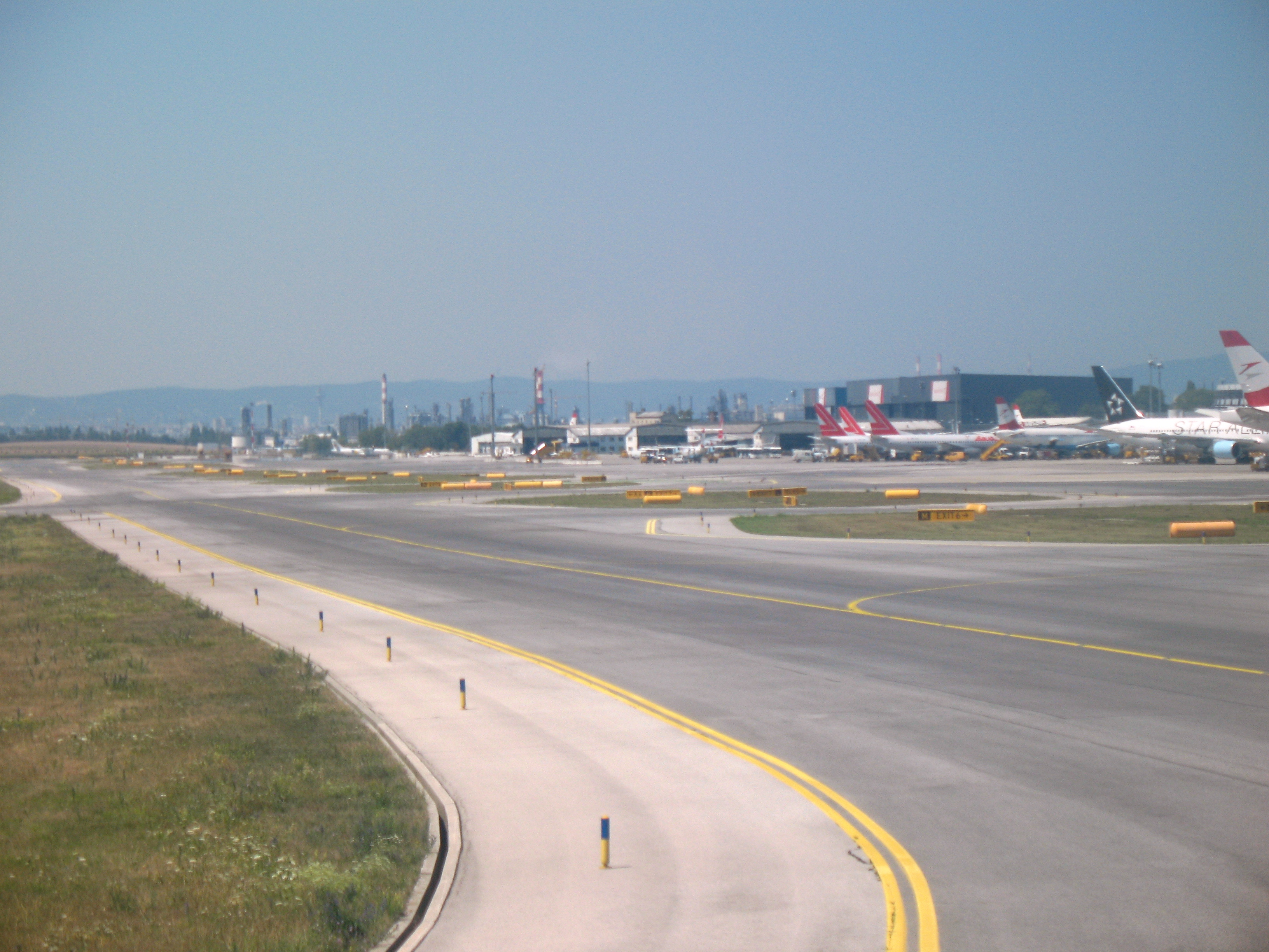 Flugplatz Flughafen Wien-Schwechat